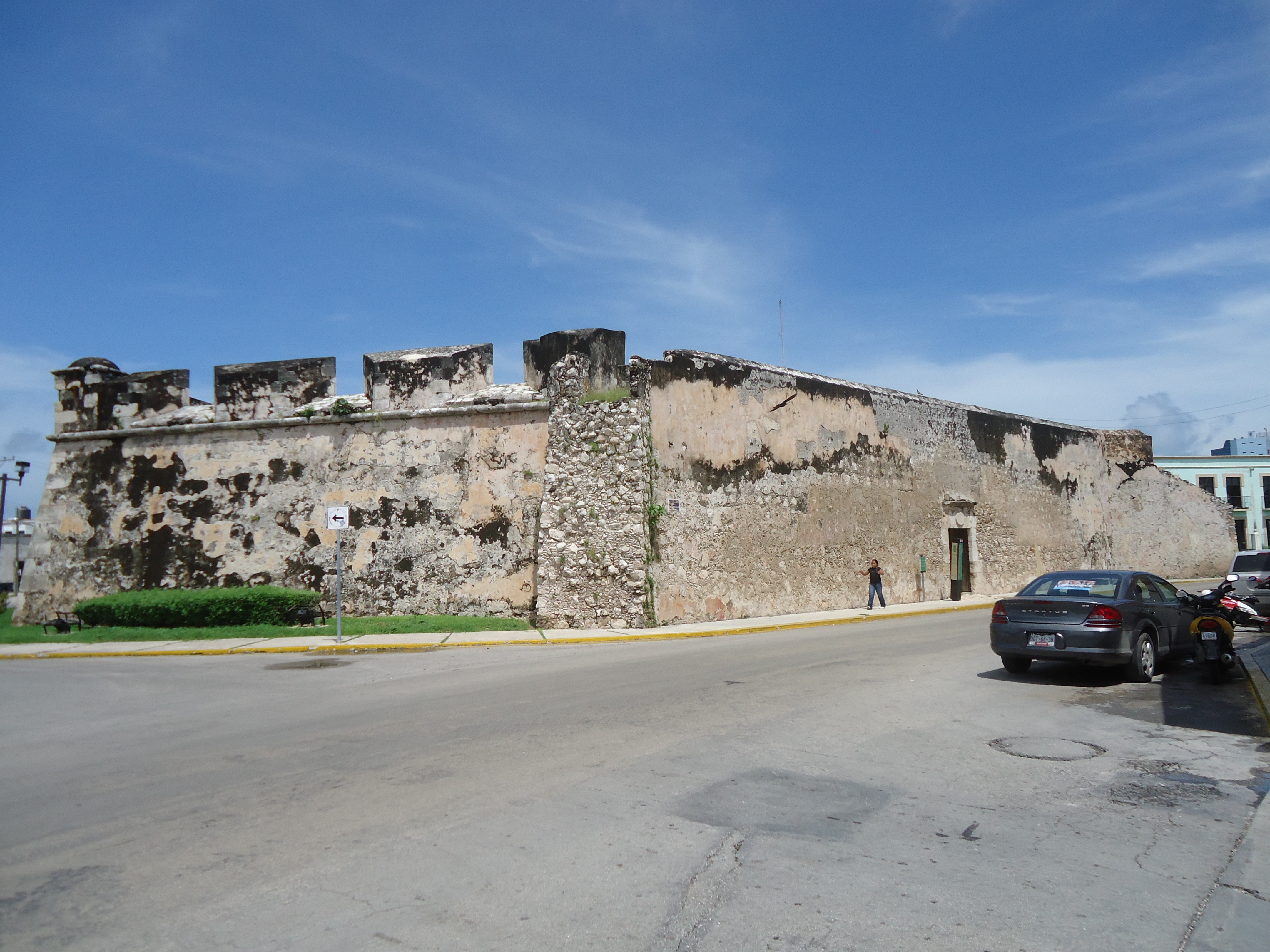 Fotografía del Baluarte de Santa Rosa, San Francisco de Campeche, Campeche